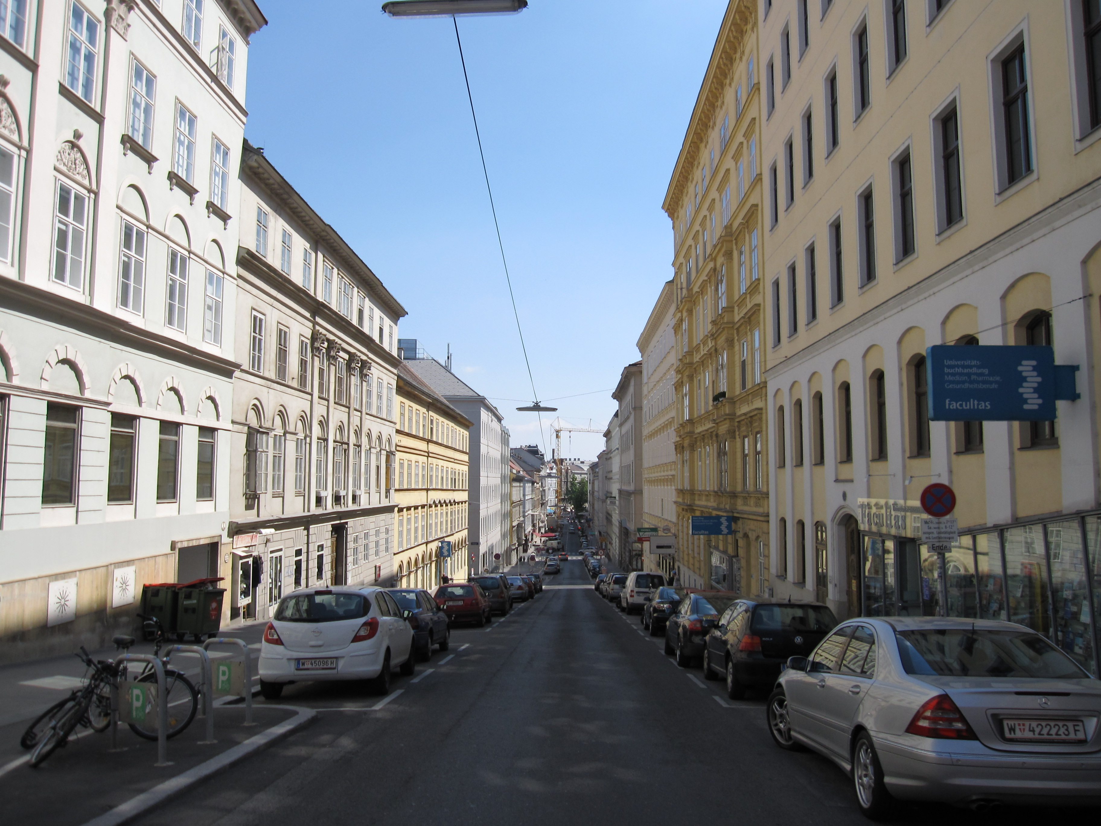 Berggasse in Vienna